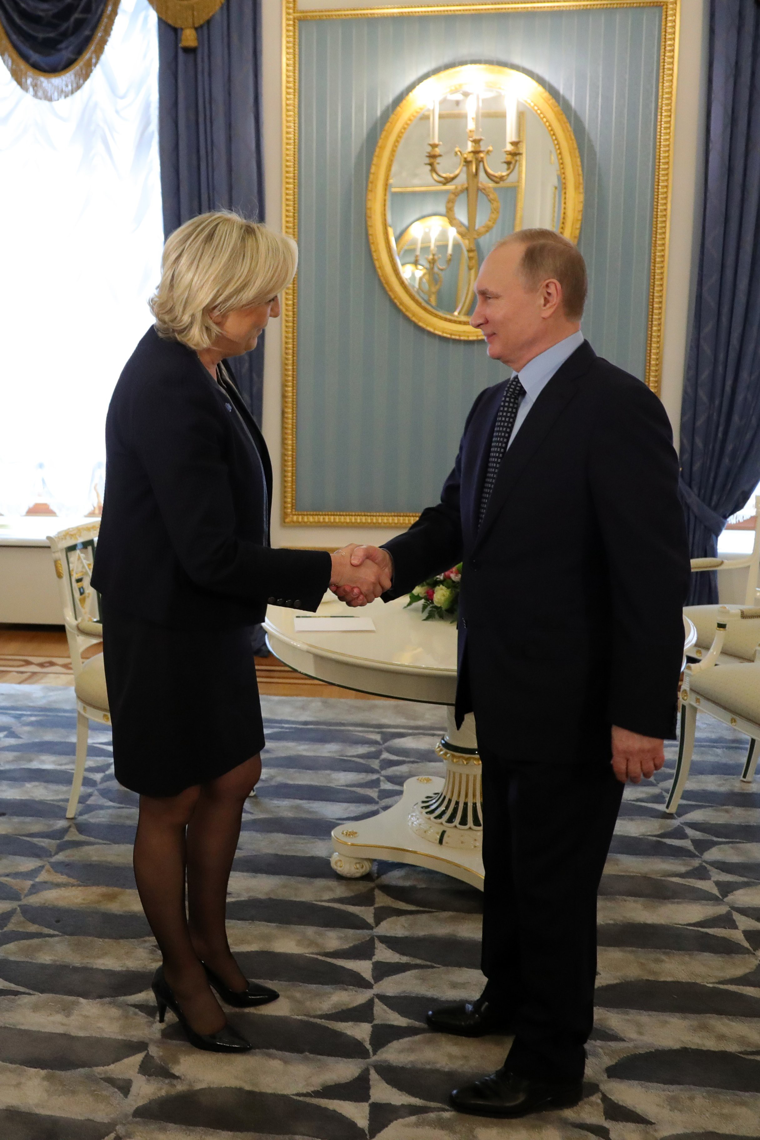 Встреча Президента России Владимира Путина с лидером политической партии Франции «Национальный фронт» Марин Ле Пен